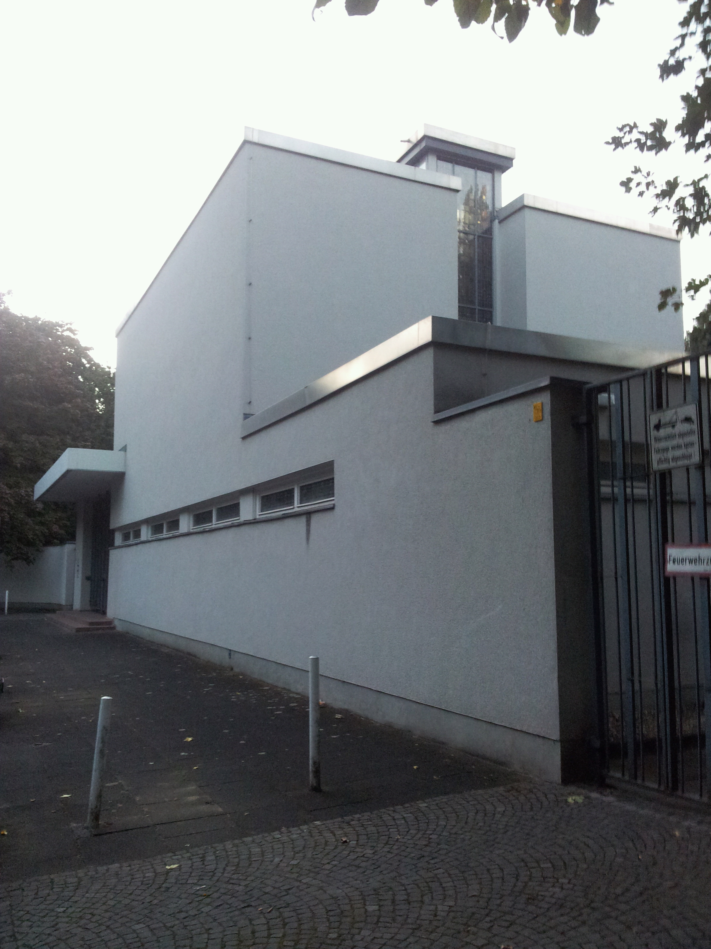 Jüdische Trauerhalle This is a photograph of an architectural monument., no. de-6327146-6(102)